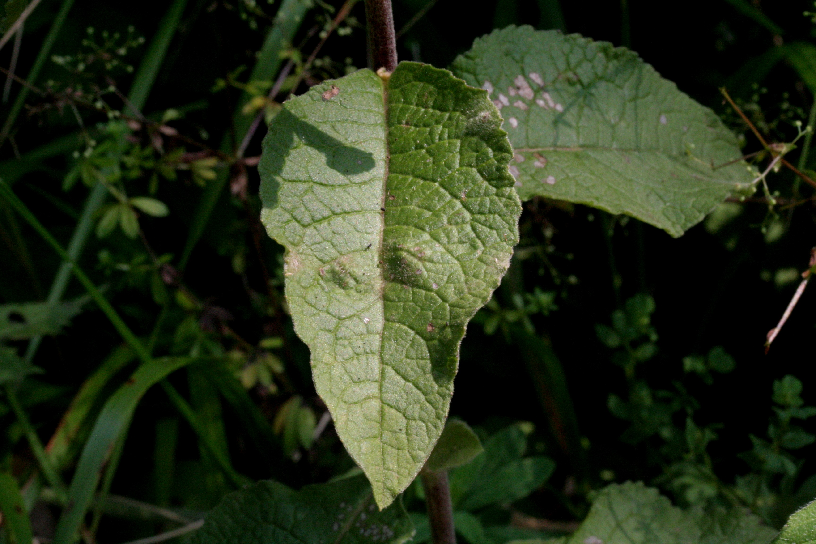 Enula baccherina – Località: Valmorel, Limana (BL), 800 m s.l.m.